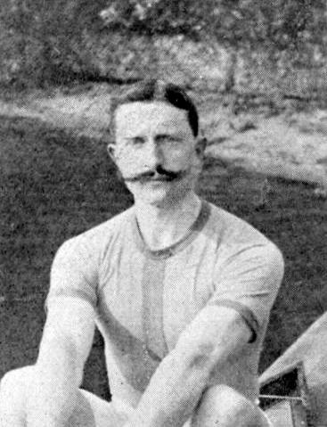 Gaston Delaplane en 1911.